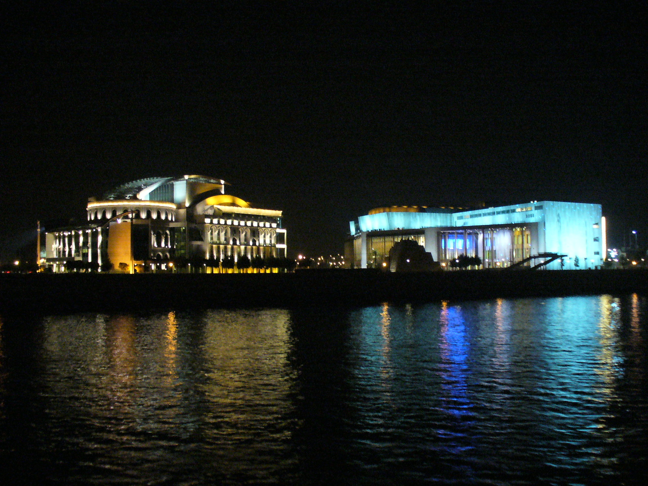 Teatro Nacional e Palácio das Artes